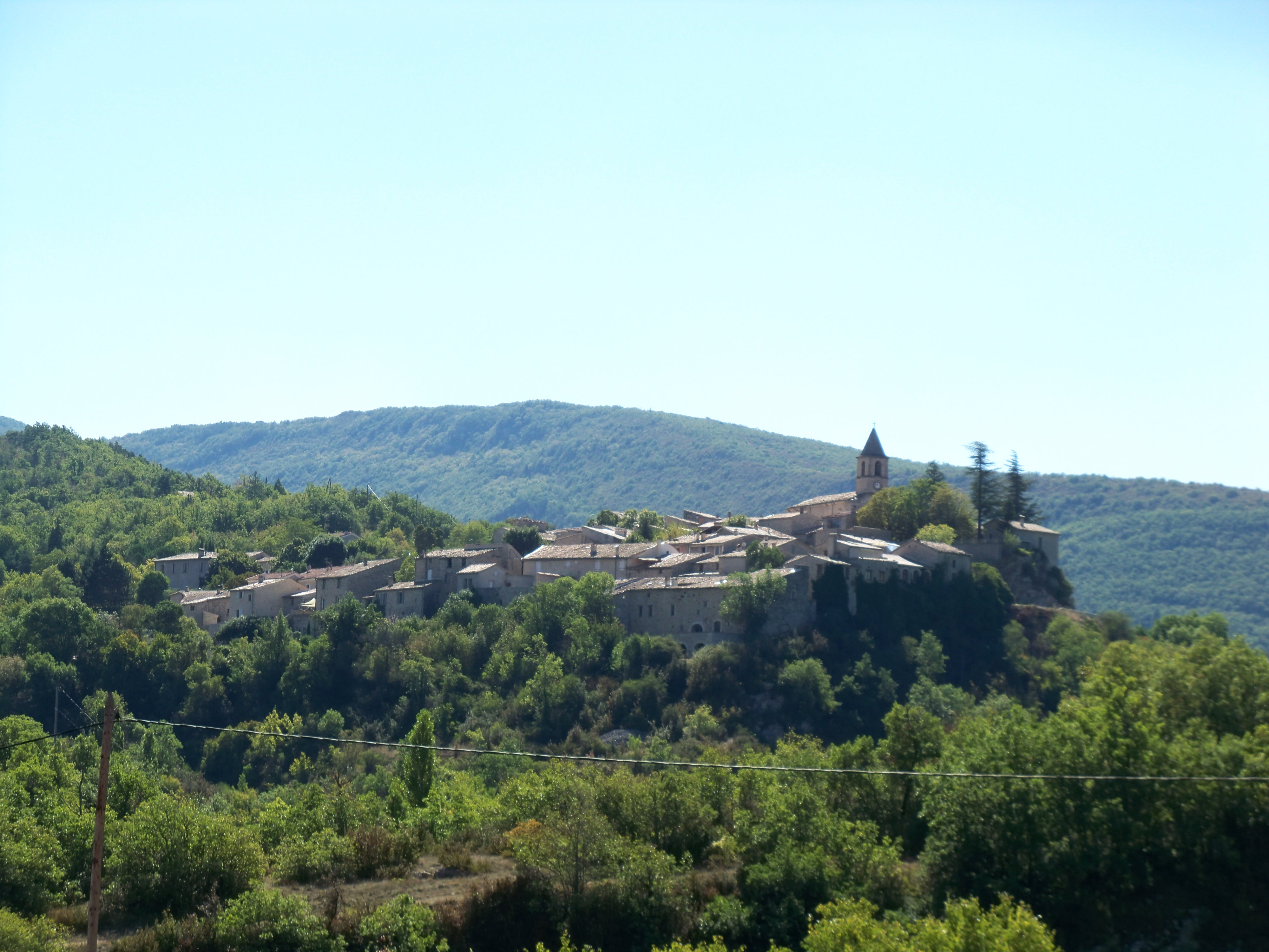 vue générale sur Saint Auban sur Ouvèze